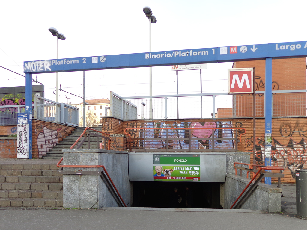 Milano, accessi alle stazioni ferroviaria e metropolitana di Romolo.